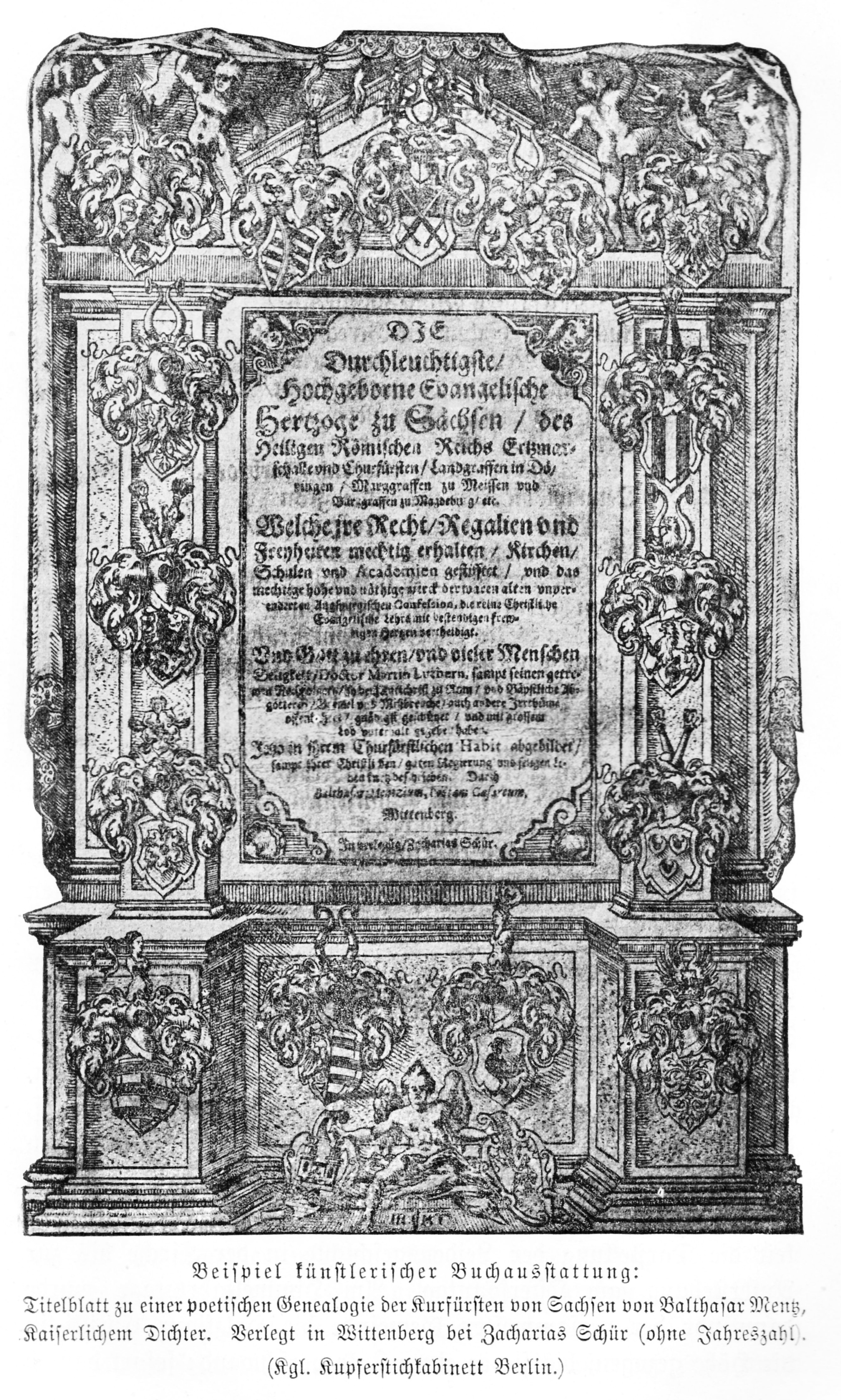 Beispiel künstlerischer Buchausstattung: Titelblatt zu einer poetischen Genealogie der Kurfürsten von Sachsen von Balthasar Mentz [sic], Kaiserlichem Dichter. Verlegt in Wittenberg bei Zacharias Schür [sic] (ohne Jahreszahl). (Kgl. Kupferstichkabinett Berlin.)